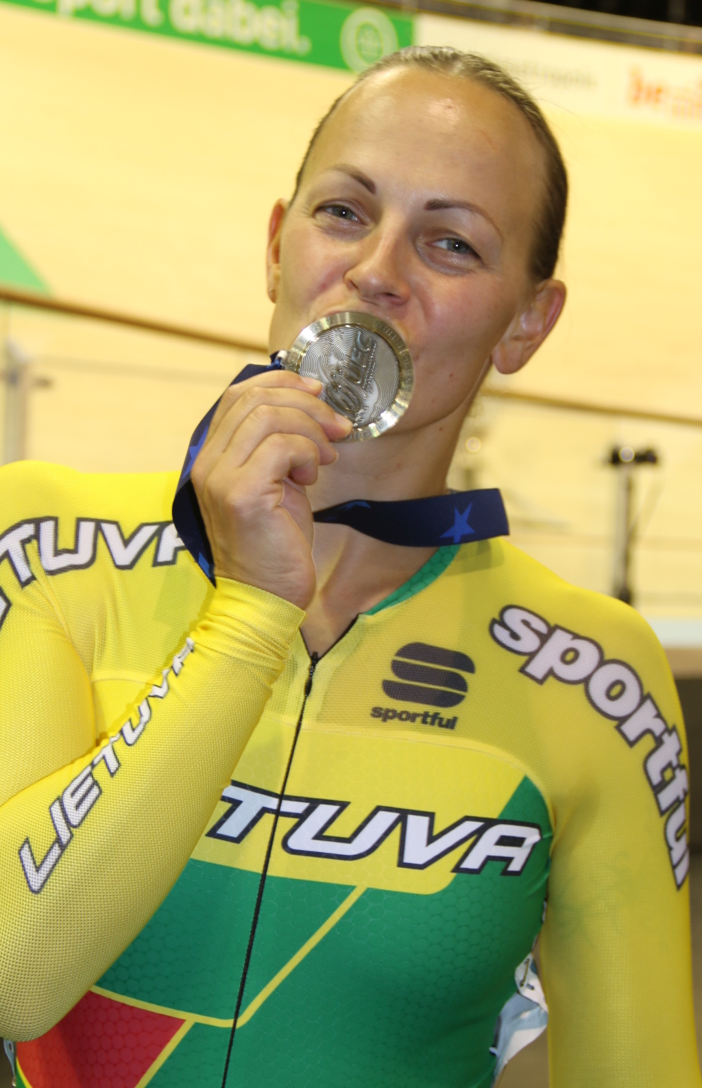 Simona Krupeckaitė, litauische Radsportlerin - Silber im Keirin